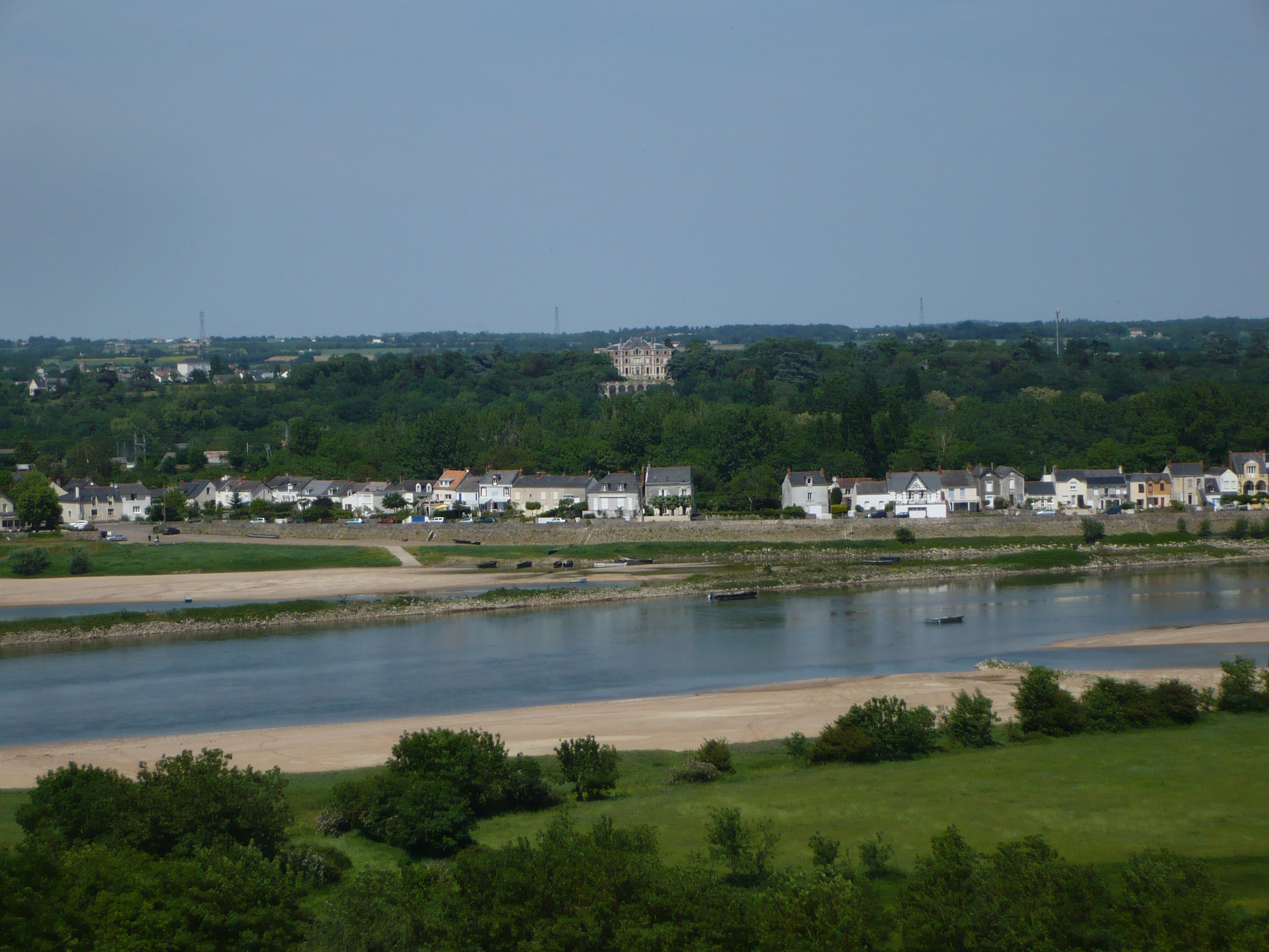 Vue de la Loire et des quais de Varades